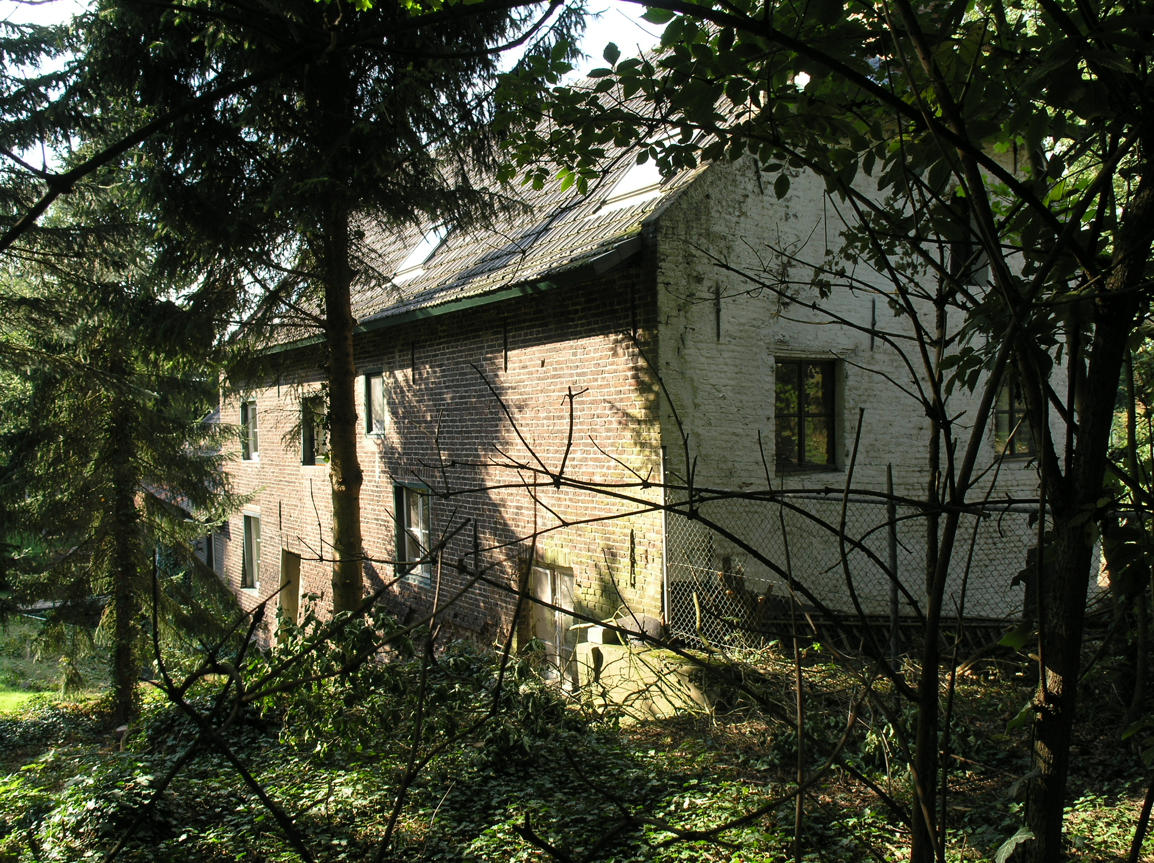 Venlo Onderste Houtmolen